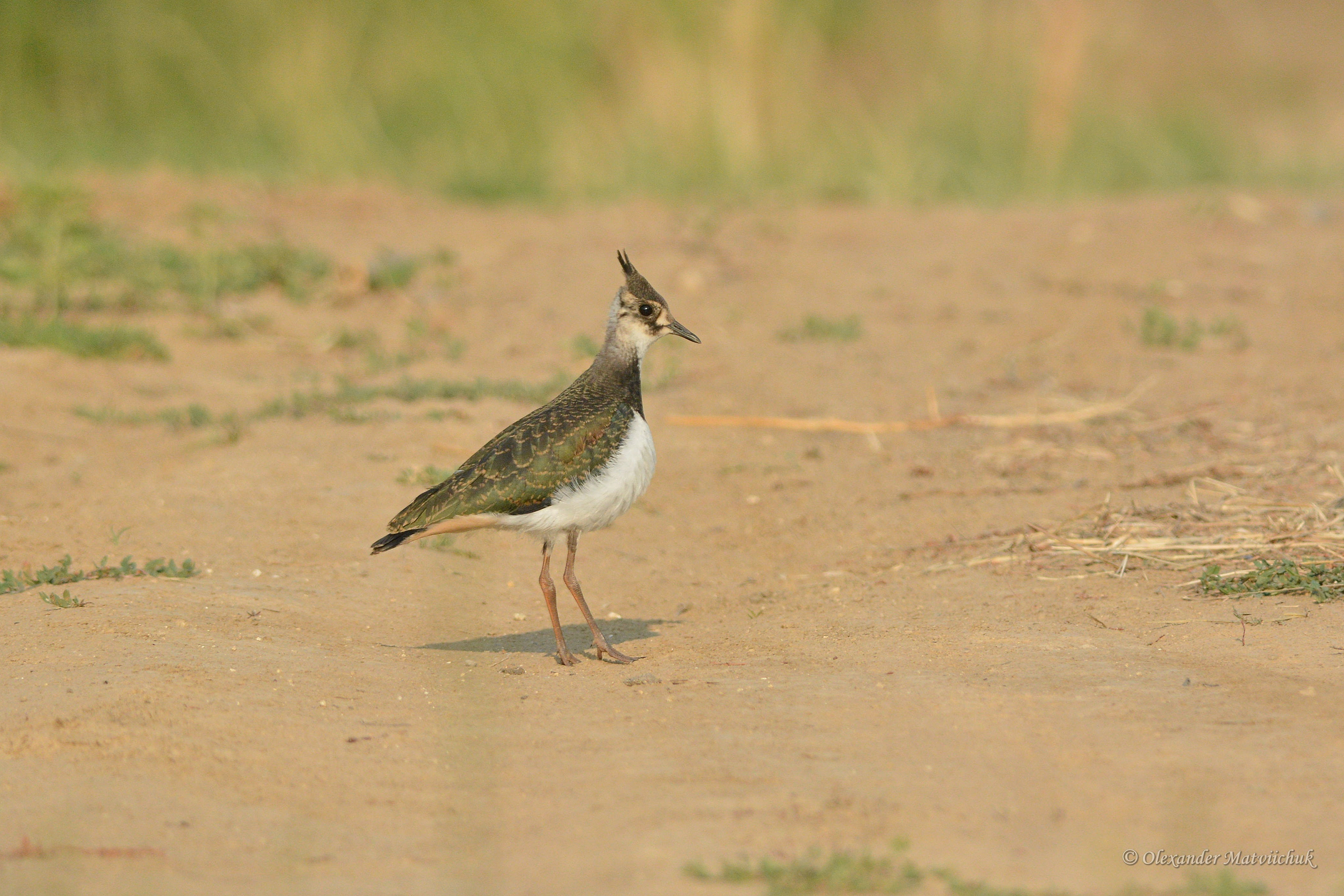 «Кармелюкове Поділля», Чечельницький р-н, Куренівська сільська рада